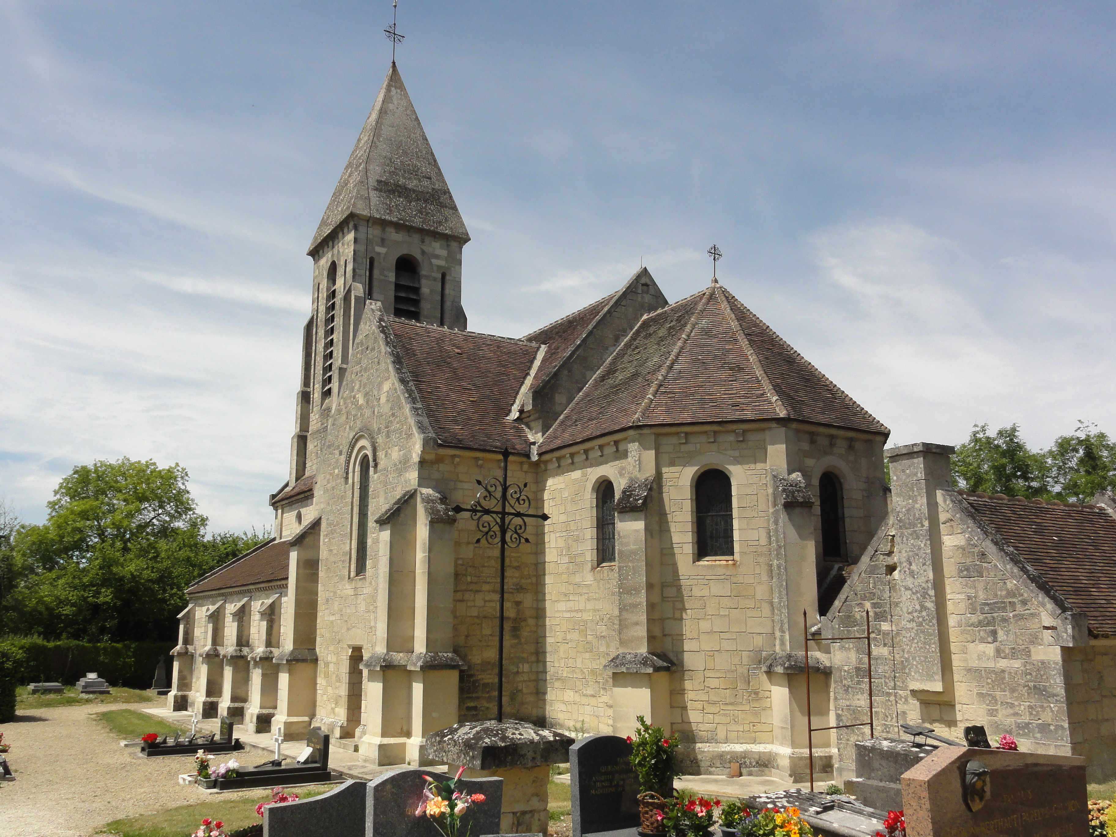 Paissy (Aisne) église